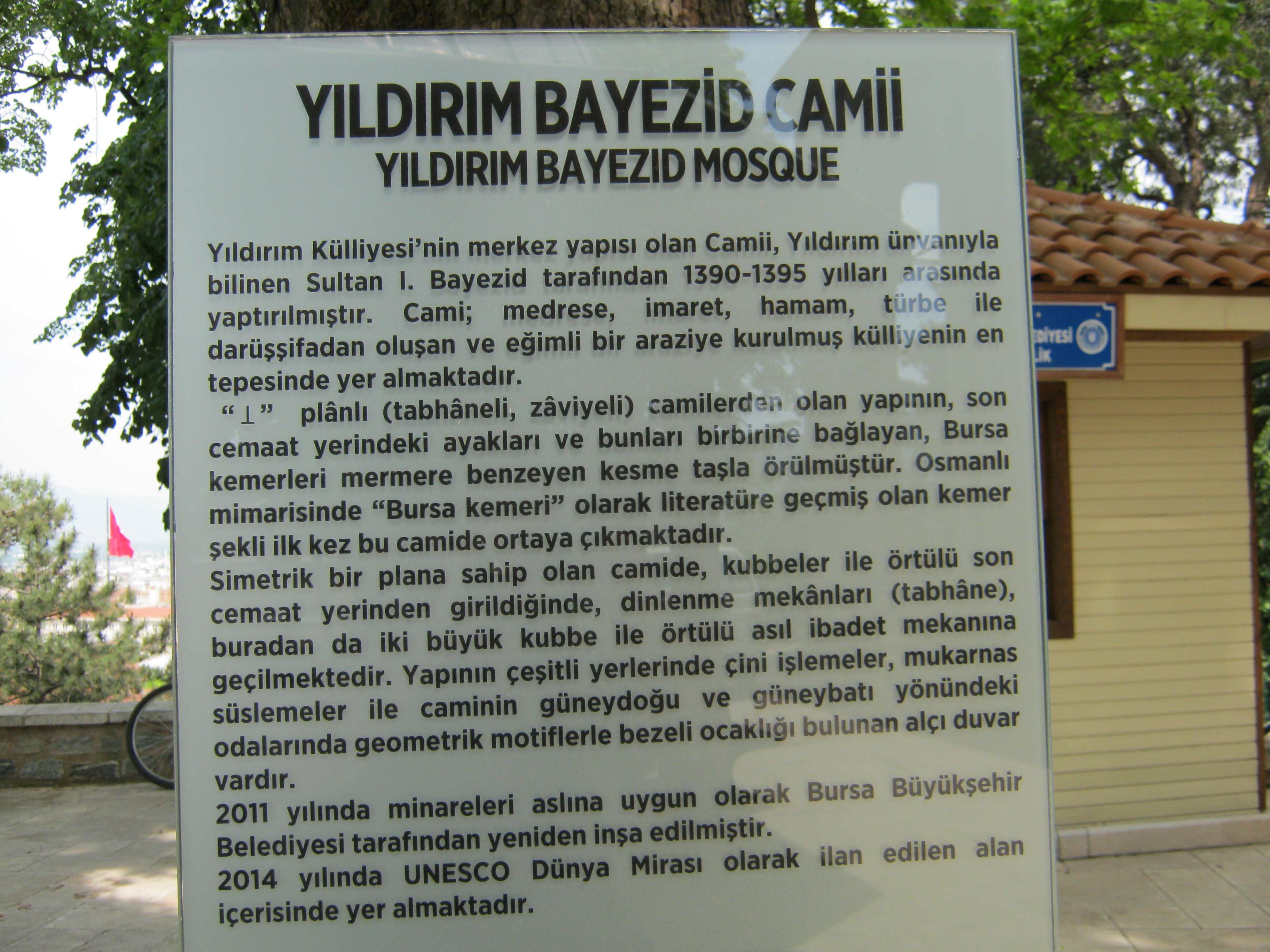 Yıldırım Bayezid Camii Bursa